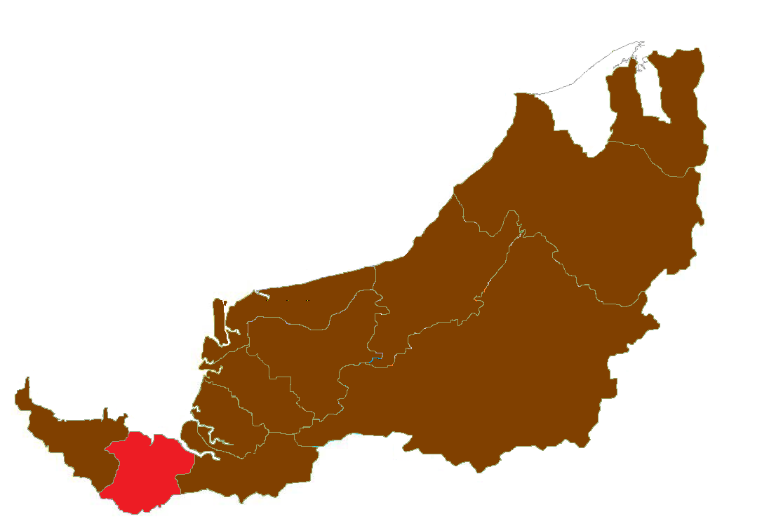 Samarahan Division